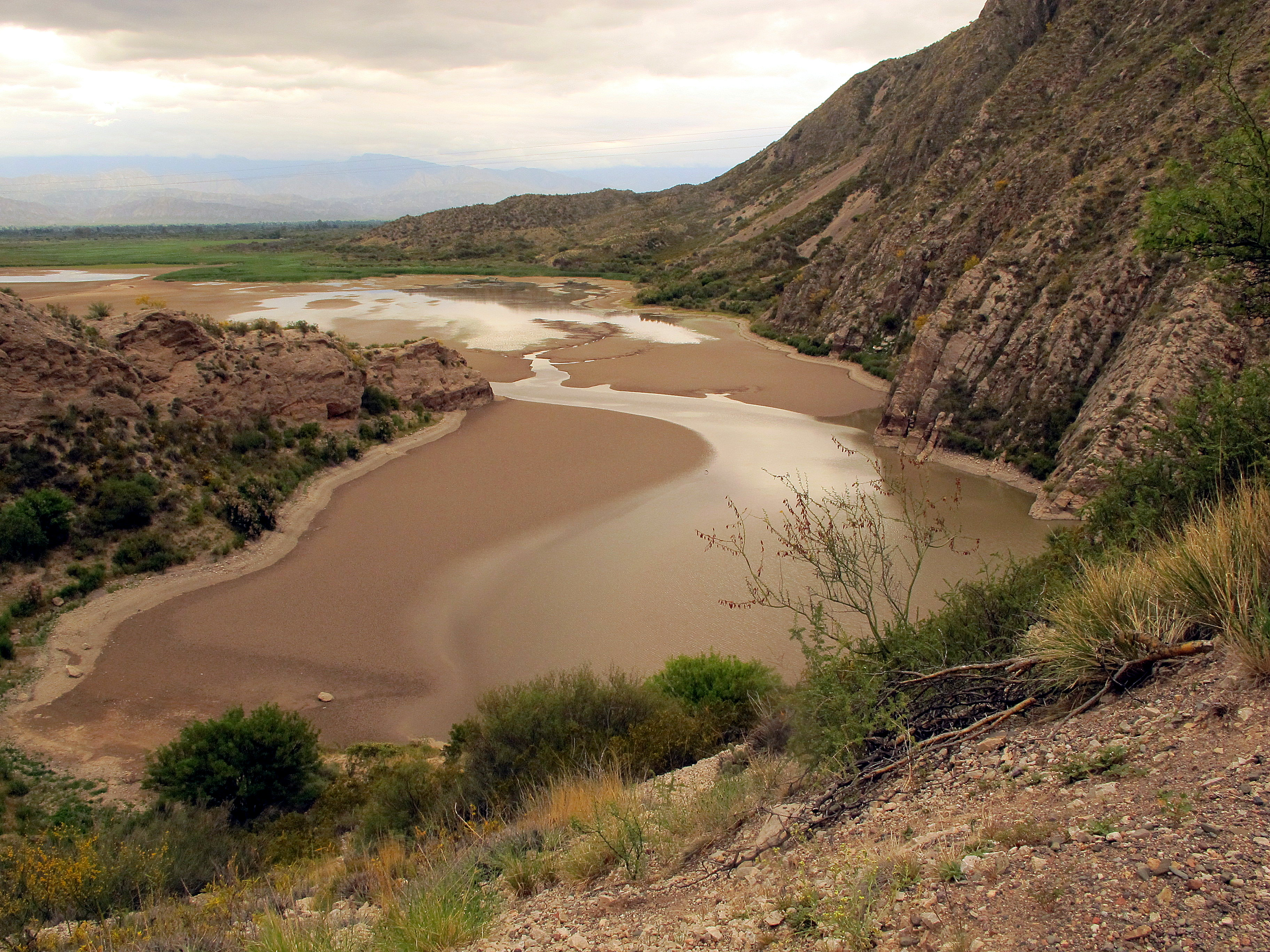 Vista de la ciénaga en la cuesta de Huaco, San Juan, Argentina.